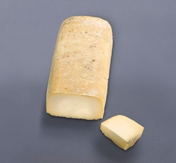 Queso de Vidiago